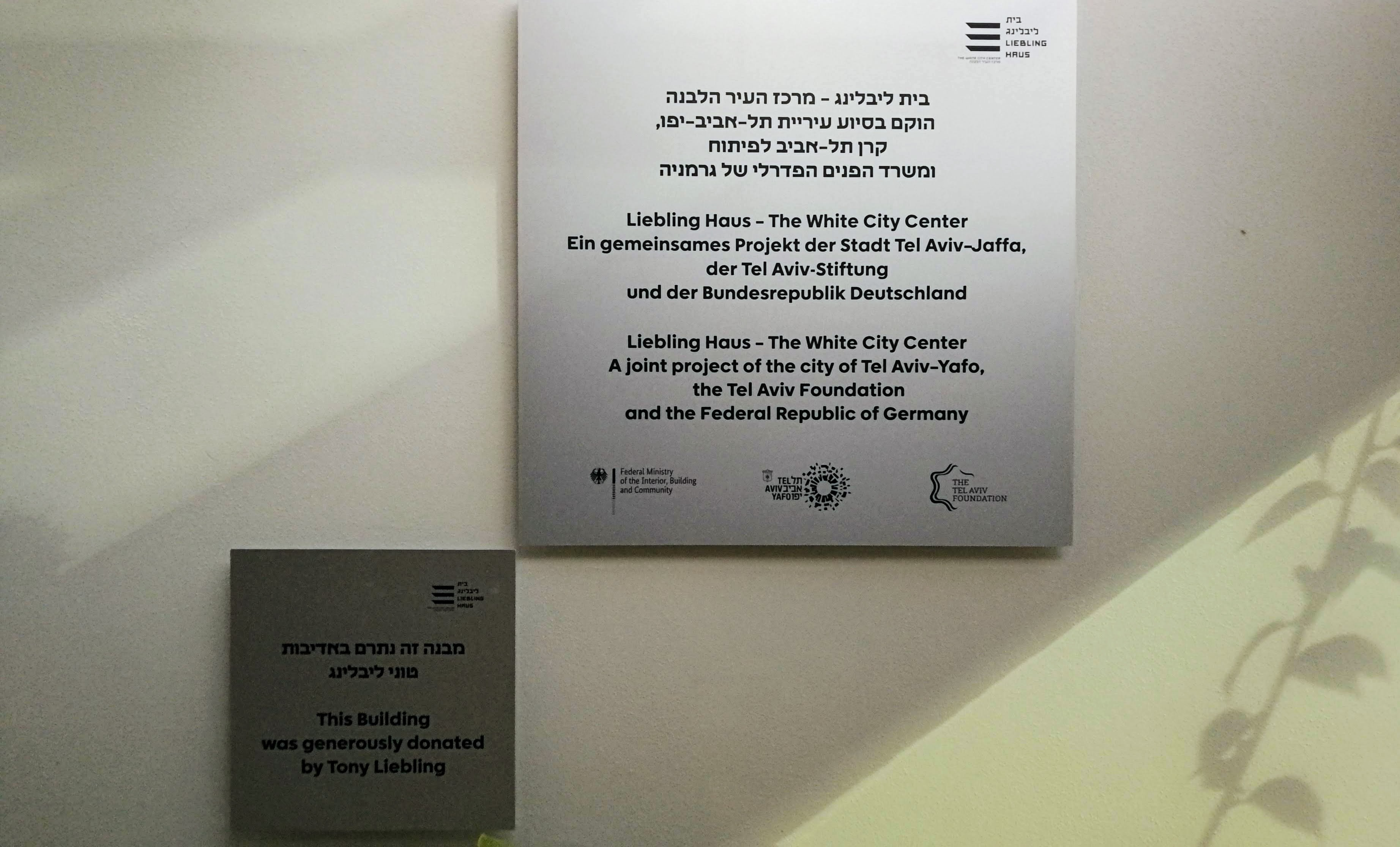 שלטים בכניסה לבית מקס ליבלינג, מרכז העיר הלבנה, בניין מודרניסטי בסגנון באוהאוס בעל משמעות אדריכלית. הבית ממוקם ברחוב אידלסון 29, תל אביב. תוכנן על ידי האדריכל דב כרמי ונבנה בשנת 1936.